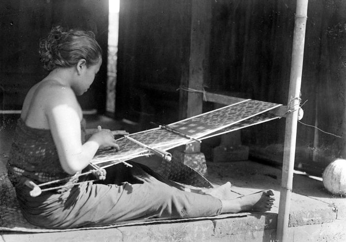 Repronegatief. Balinese weefster, Tenganan